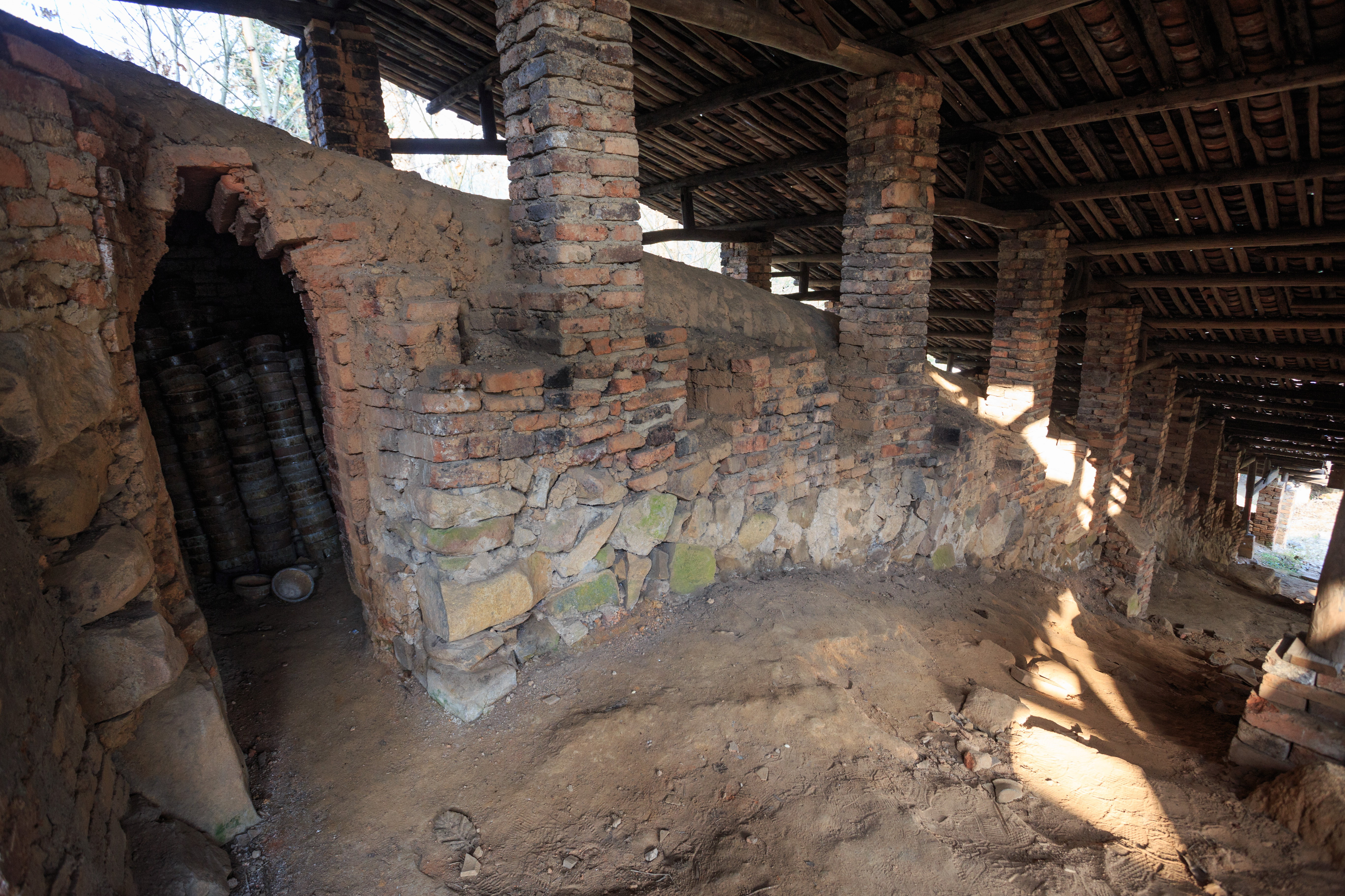 三卿口制瓷作坊 龙窑